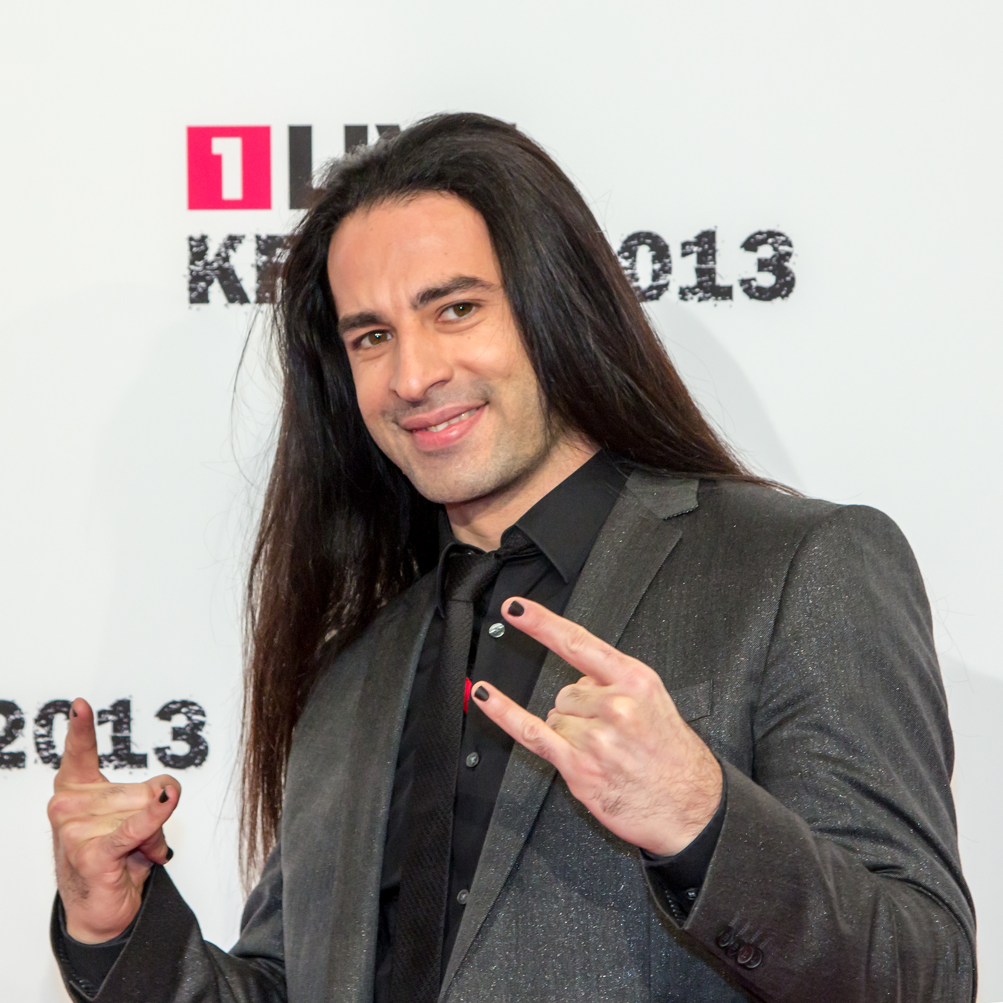 1LIVE Krone 2013: Bülent Ceylan auf dem roten Teppich